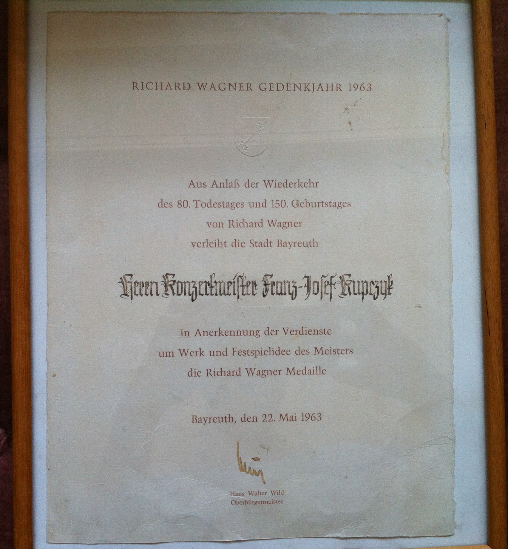 Richard Wagner Medaille für Konzertmeister Franz-Josef Kupczyk